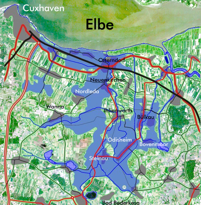 Betroffenes Gebiet bei einer „kleinen“ Sturmflut von nur 4,50 m, das markierte Gebiet liegt von -2 bis 0.5 m unter NN und würde minimal 50 cm unter Wasser stehen.